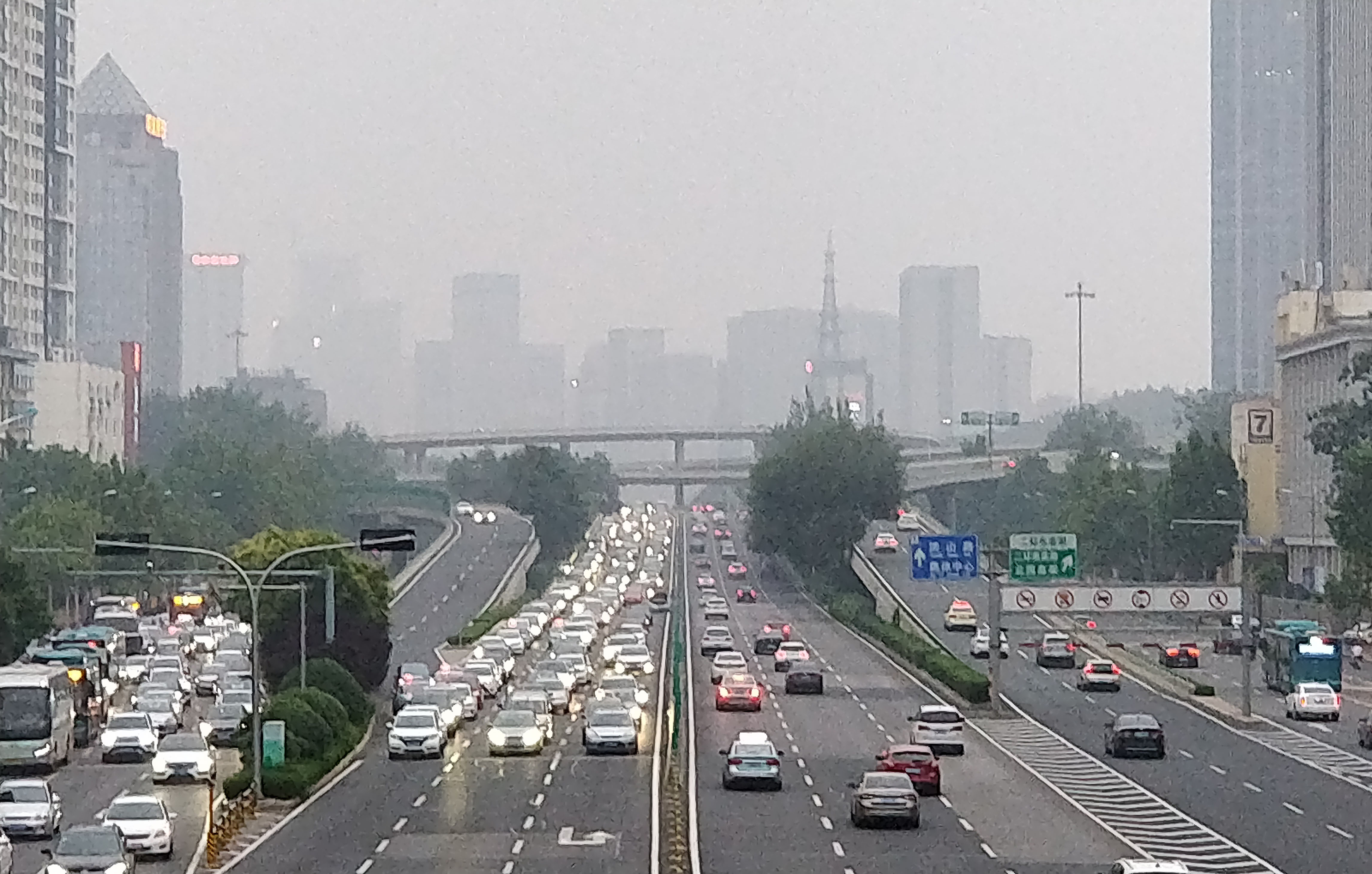 中文（中国大陆）: 济南燕山立交桥